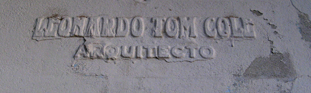 Firma de Leonardo Tom Cole, el arquitecto que diseñó el estadio Juan Carlos Zerillo, de Gimnasia y Esgrima de La Plata (Argentina).